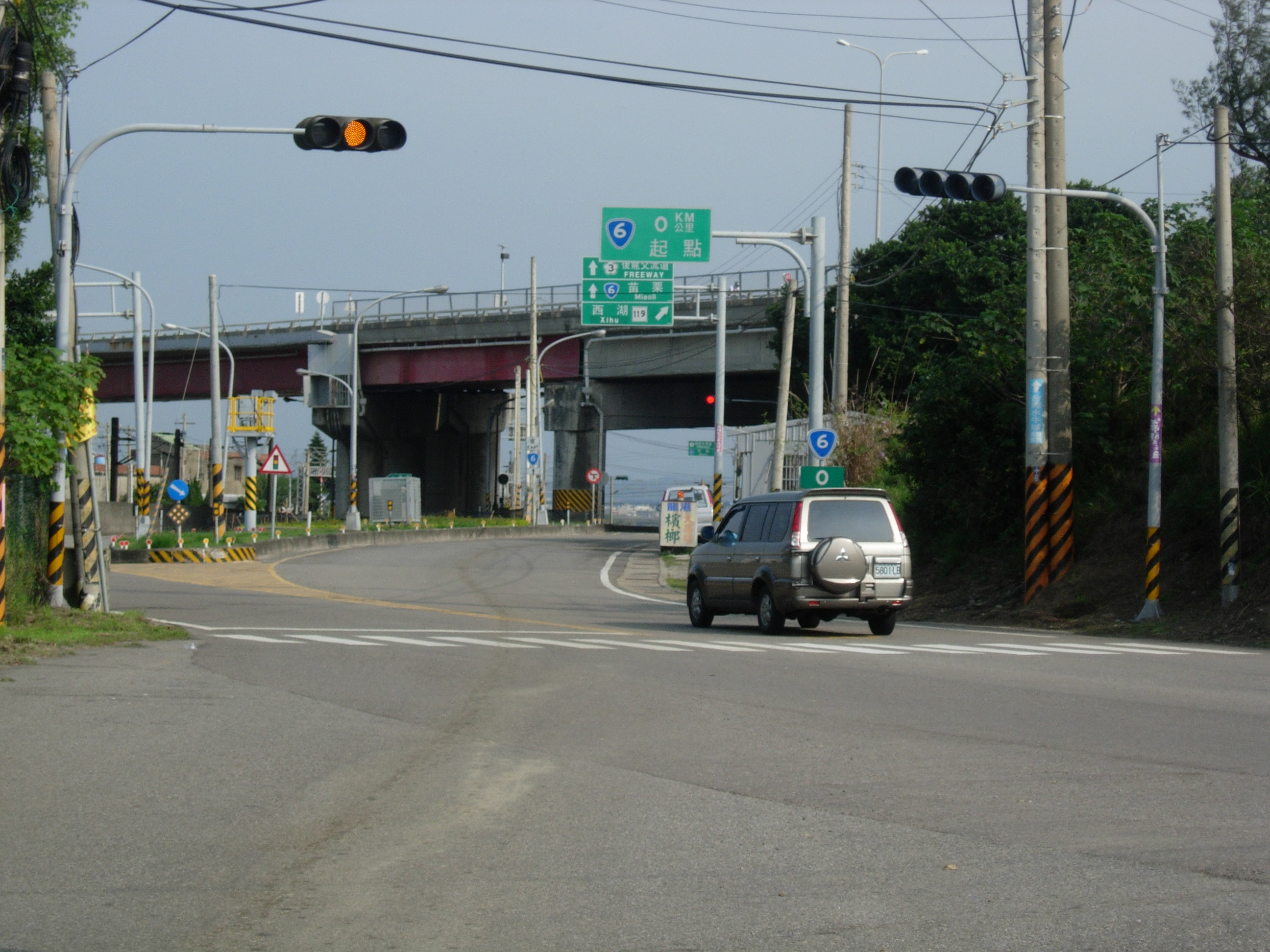 中文（台灣）: 台6線起點龍港